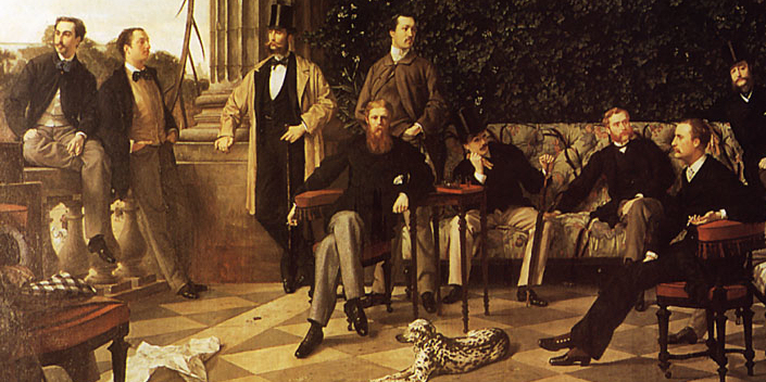 Tableau en cours d'acquisition par le Musée d'Orsay à Paris. Identification de gauche à droite : Comte de La Tour-Maubourg, Marquis de Lau, Comte de Ganay, Comte de Rochechouart, C. Vansittant, Marquis de Miramon, Baron Hottinguer qui sera désigné propriétaire du tableau par tirage au sort), Marquis de Ganay, Gaston de Saint-Maurice, Prince de Polignac, Marquis de Gallifet et Charles Haas (Musée d'Orsay : James Tissot, Le Cercle de la rue Royale).